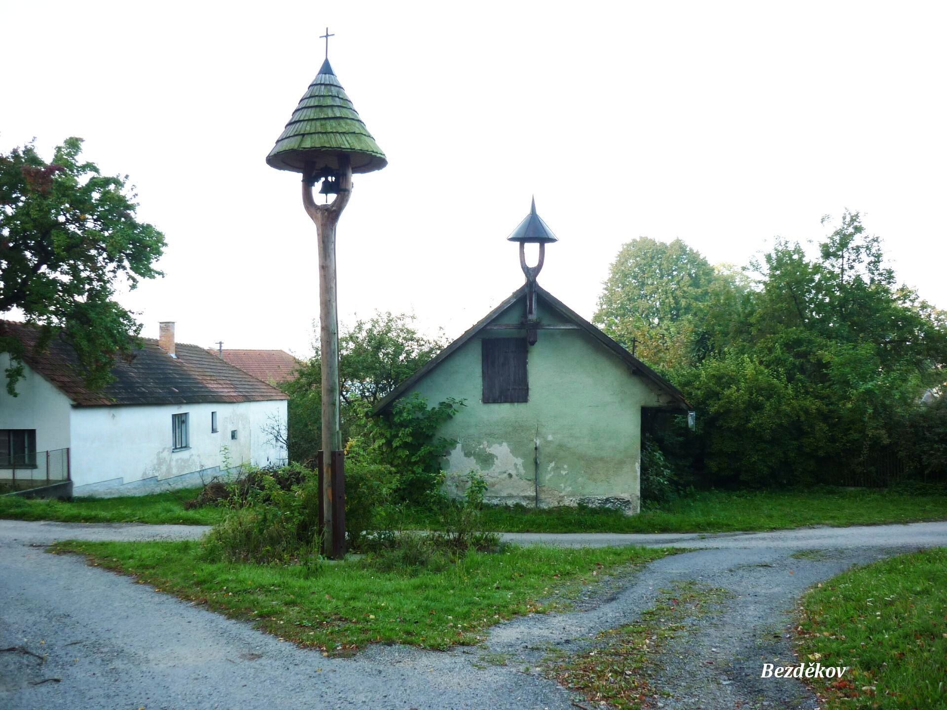 Bezděkov - zvonička na návsi